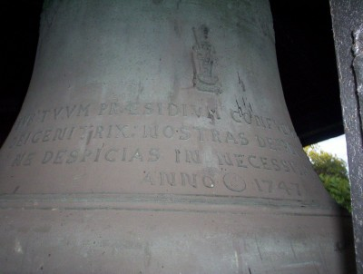 Dzwon kościoła św. Marcina z 1747 roku poświęcony Matce Bożej.